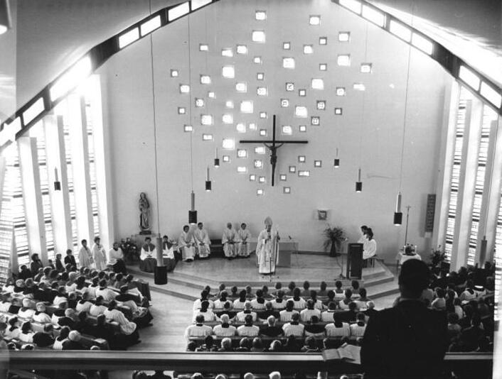 Neubrandenburg, Katholische Pfarrgemeinde, Weihgottesdienst ADN-ZB Bartocha 18.10.80 Neubrandenburg: Eine neue, moderne Kirche wurde der katholischen Pfarrgemeinde von Neubrandenburg am 18.10.80 übergeben. Der Weihgottesdienst hielt Bischof Heinrich Theissing aus Schwerin. - siehe auch W1018-29n